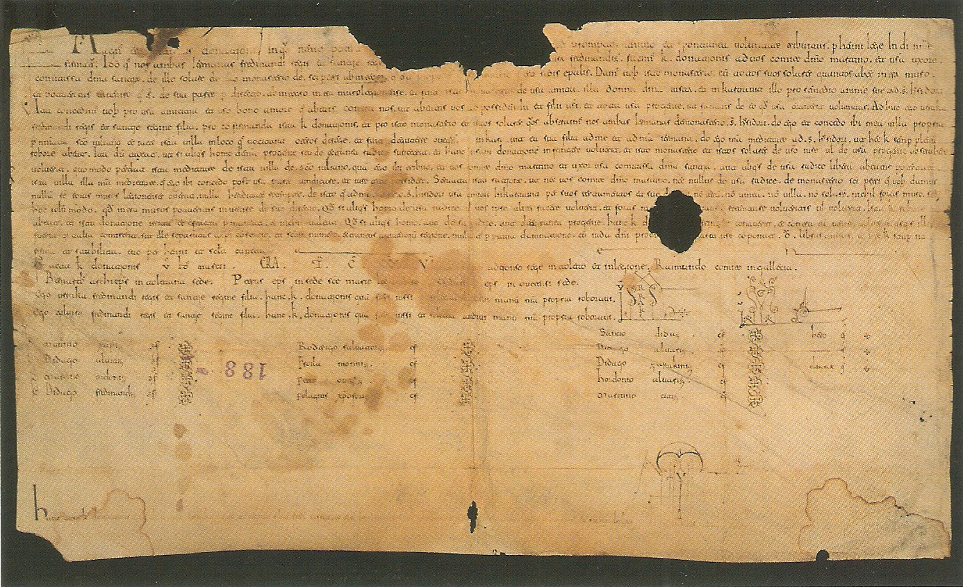 Carta de donación de las infantas Urraca y Elvira, hijas de Fernando I de León y dóminas del Infantado, a la basílica de San Isidoro de León. El documento fue otorgado el día 11 de marzo de 1099 y en él aparecen las firmas de las dos infantas. El documento se conserva en el Archivo de la basílica de San Isidoro de León, provincia de León (España).